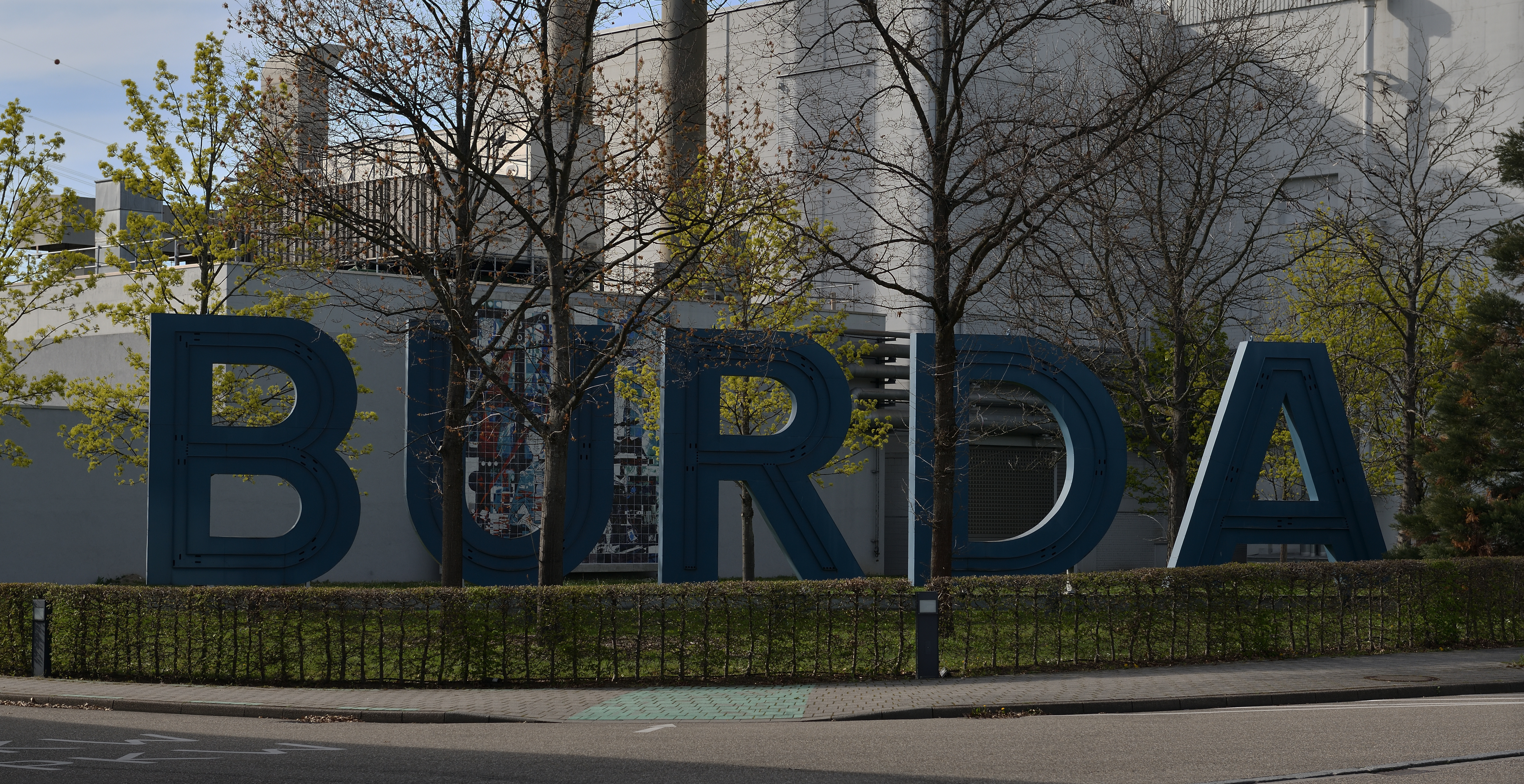 Offenburg: Burda Media Gelände